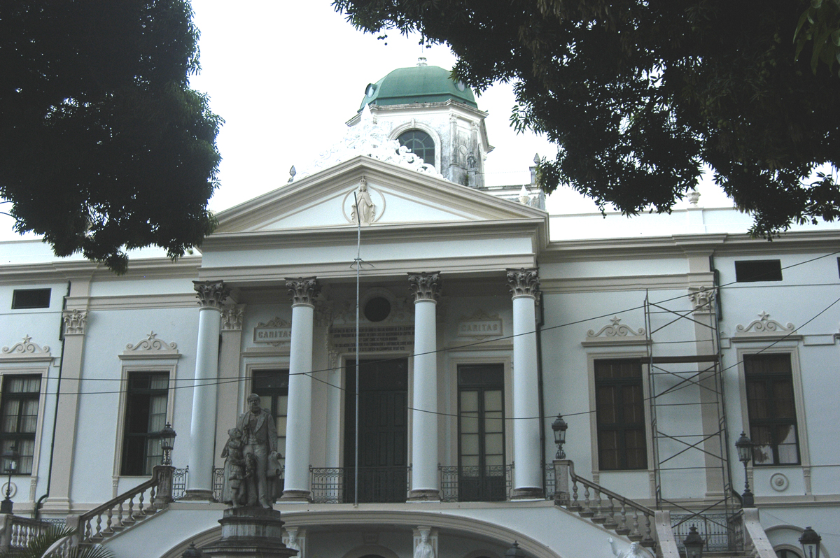 Hospital Santa Izabel administrado Ordem das Santas Casas de Misericórdia, Salvador, Bahia, Brasil, 1893 (detalhe da fachada em reforma)